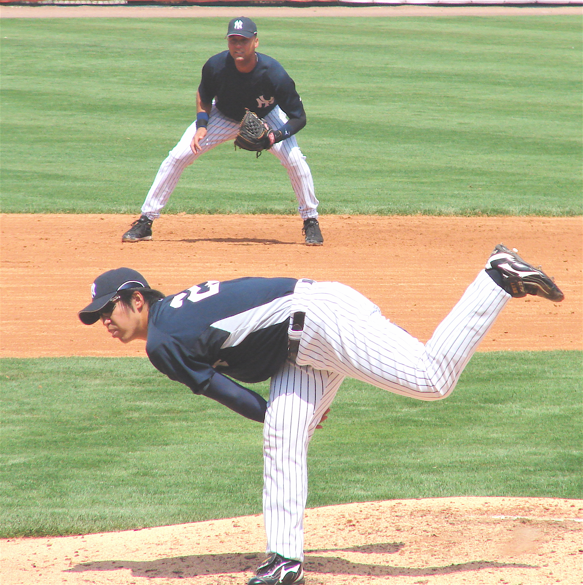 井川慶 / Kei Igawa